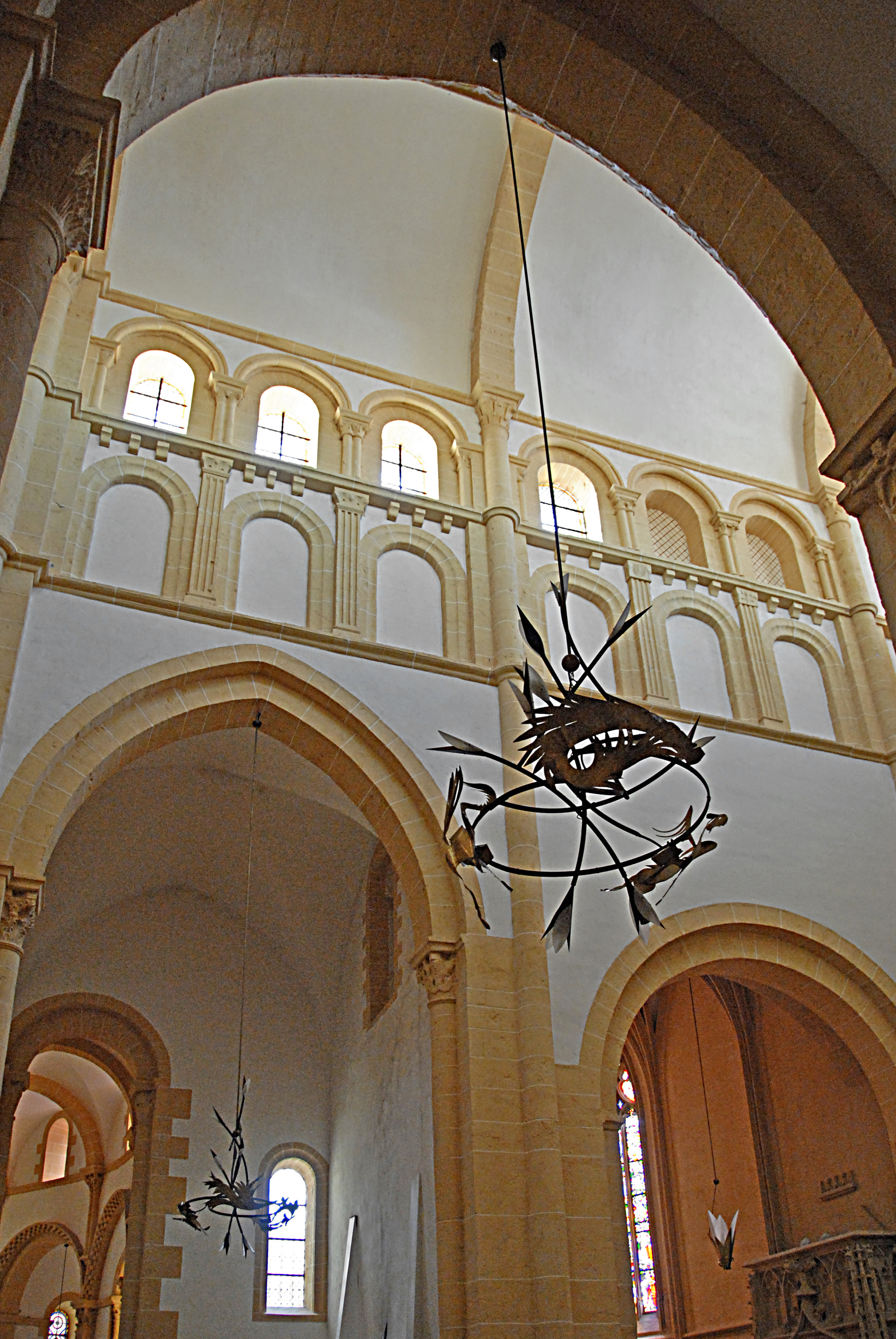 südl. Querhausarm, Ostwand